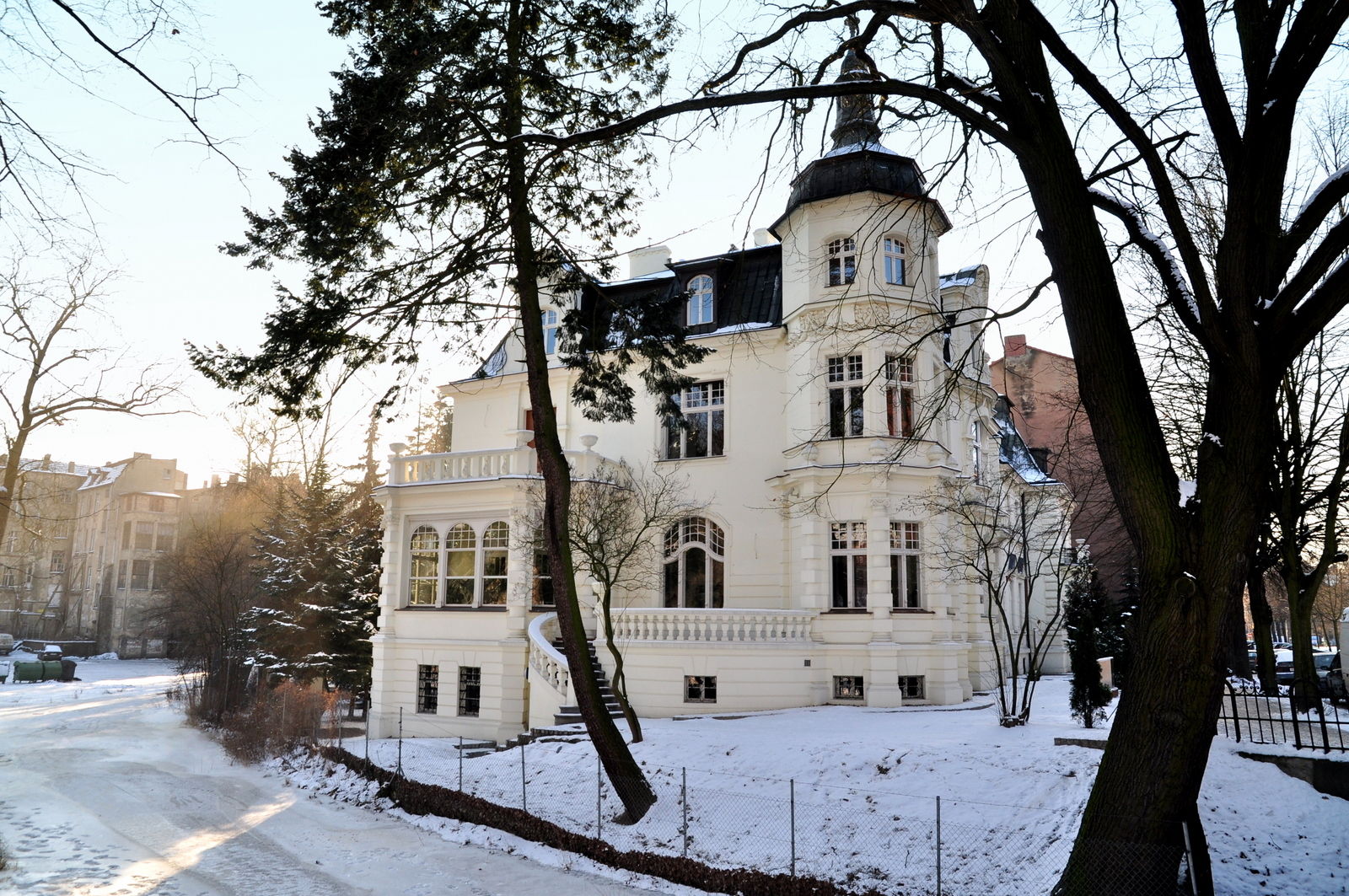 Gorzów Wielkopolski, ul. 30 Stycznia 1 - wille braci Maxa i Roberta Bahrów, elewacja wschodnia (zabytek nr rejestr. L-291/A). Wzdłuż ogrodzenia płynie Kłodawka, która zamarzła.